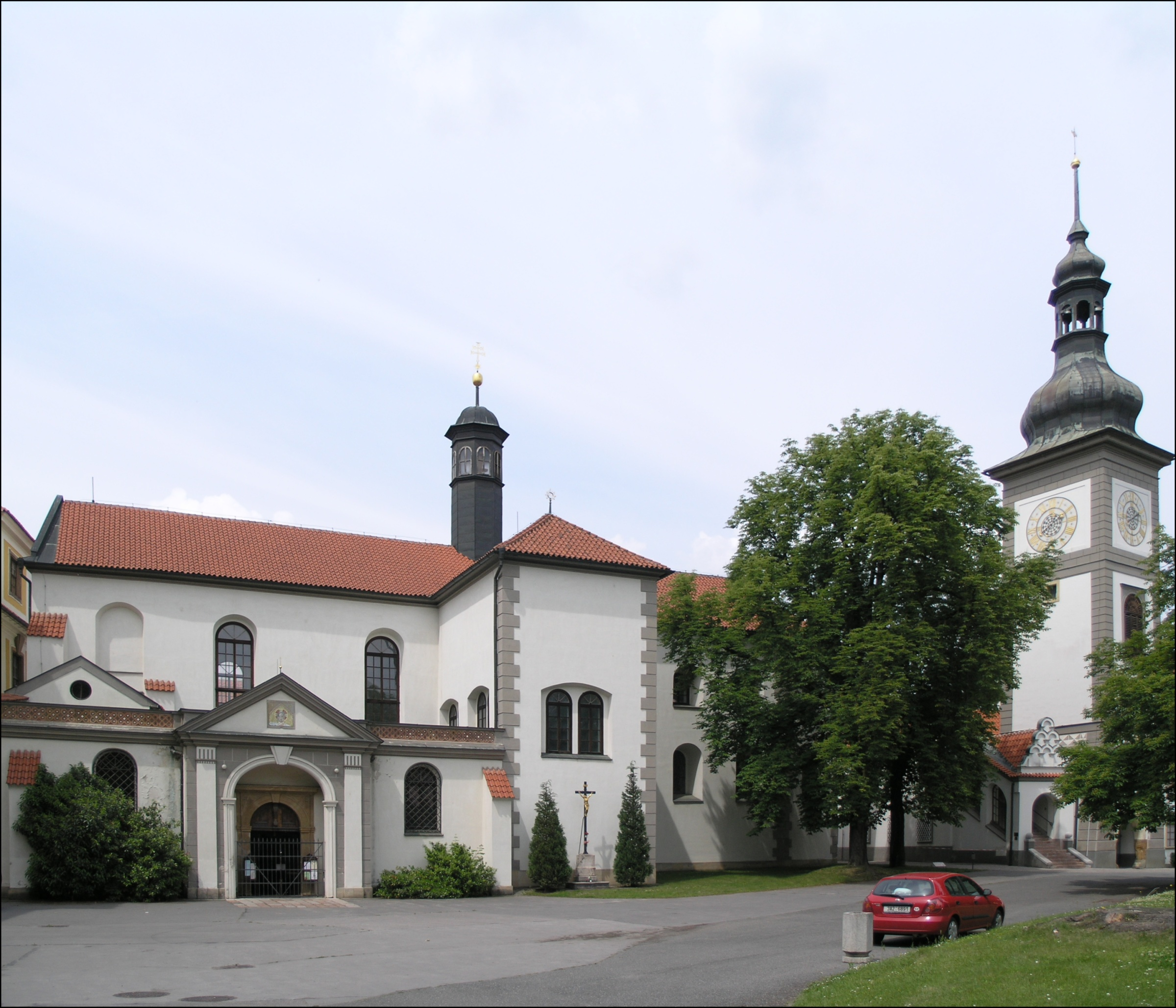 Kostel svatého Jakuba Většího v areálu Zbraslavského zámku